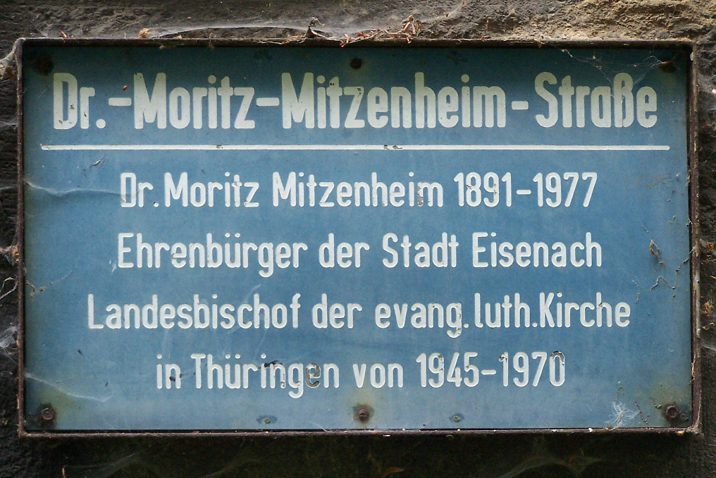 Das Erläuterungsschild zum Straßennamen befindet sich am ehemaligen Gärtnerhaus im Stadtpark.